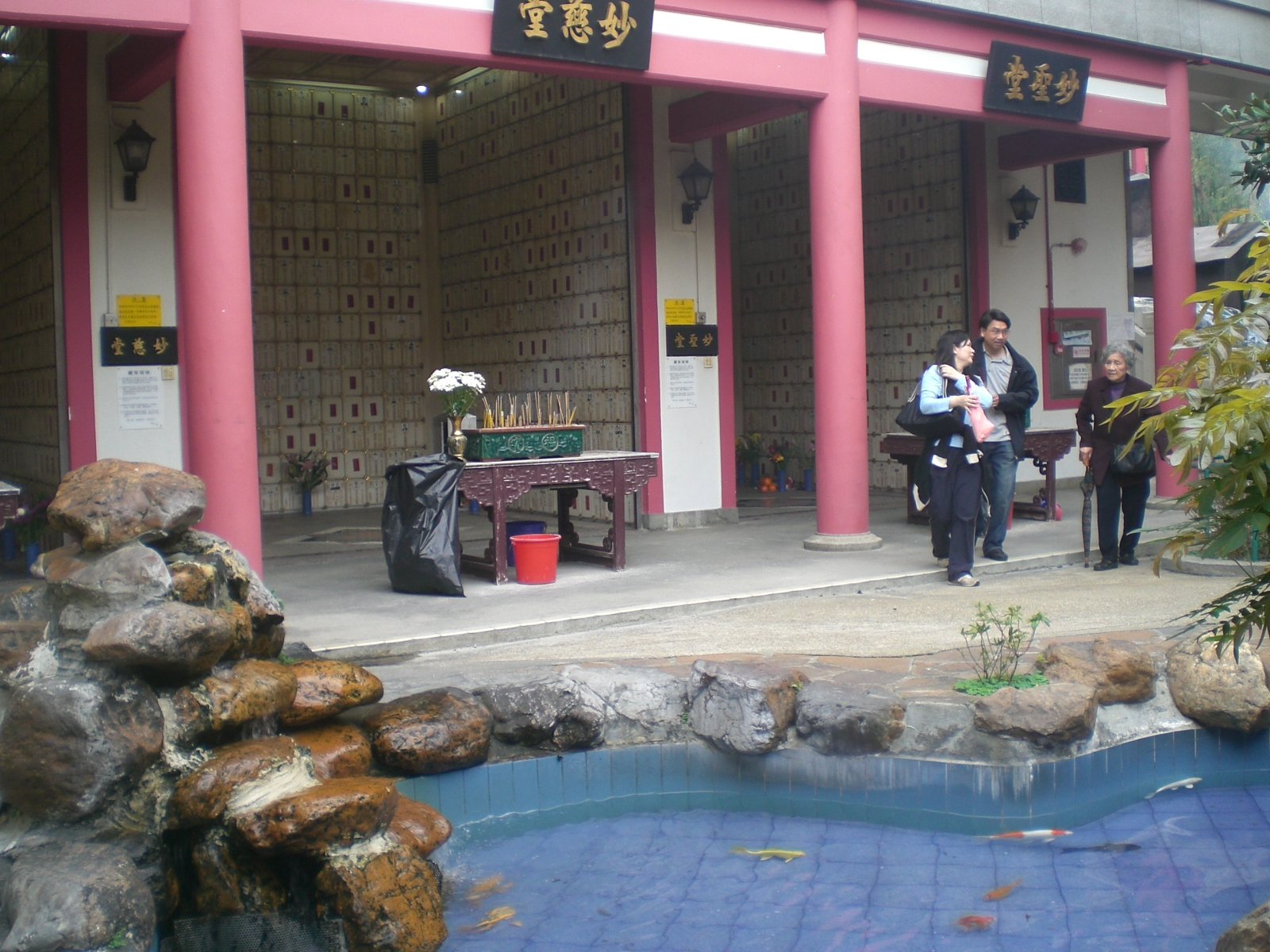 沙田寶福山園內環境 骨灰龕